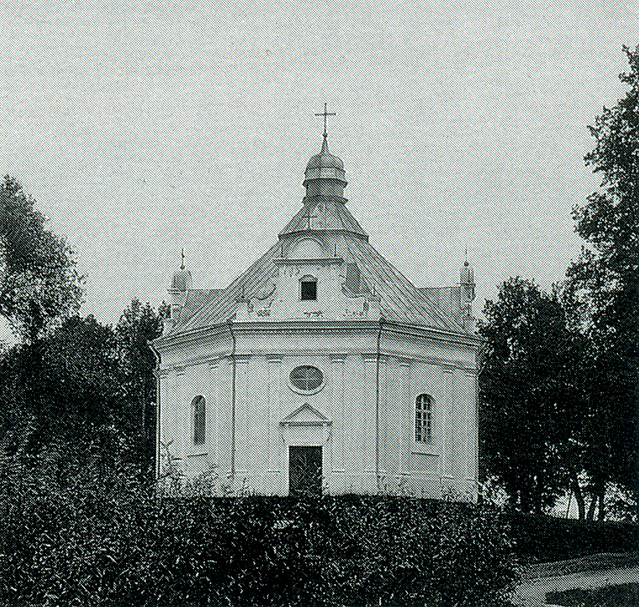 Беларуская (тарашкевіца): Капліца Найсьвяцейшай Панны Марыі ў былой в. Лошыца. Фота пачатку XX cт.